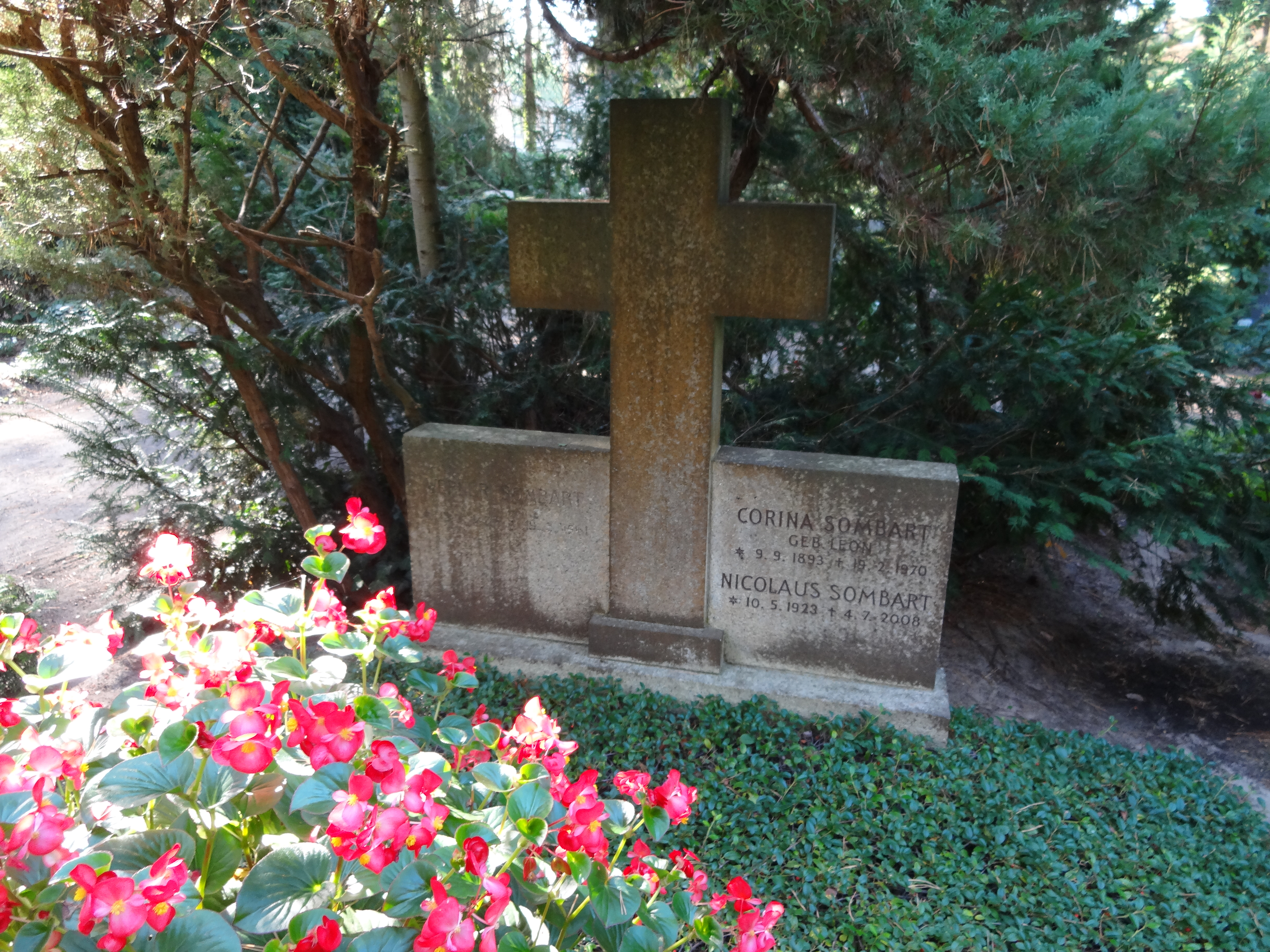 Ehrengrab für Sombart, Werner auf dem Waldfriedhof Dahlem; der Friedhof ist ein Gartendenkmal in BerlinThis is a photograph of an architectural monument.